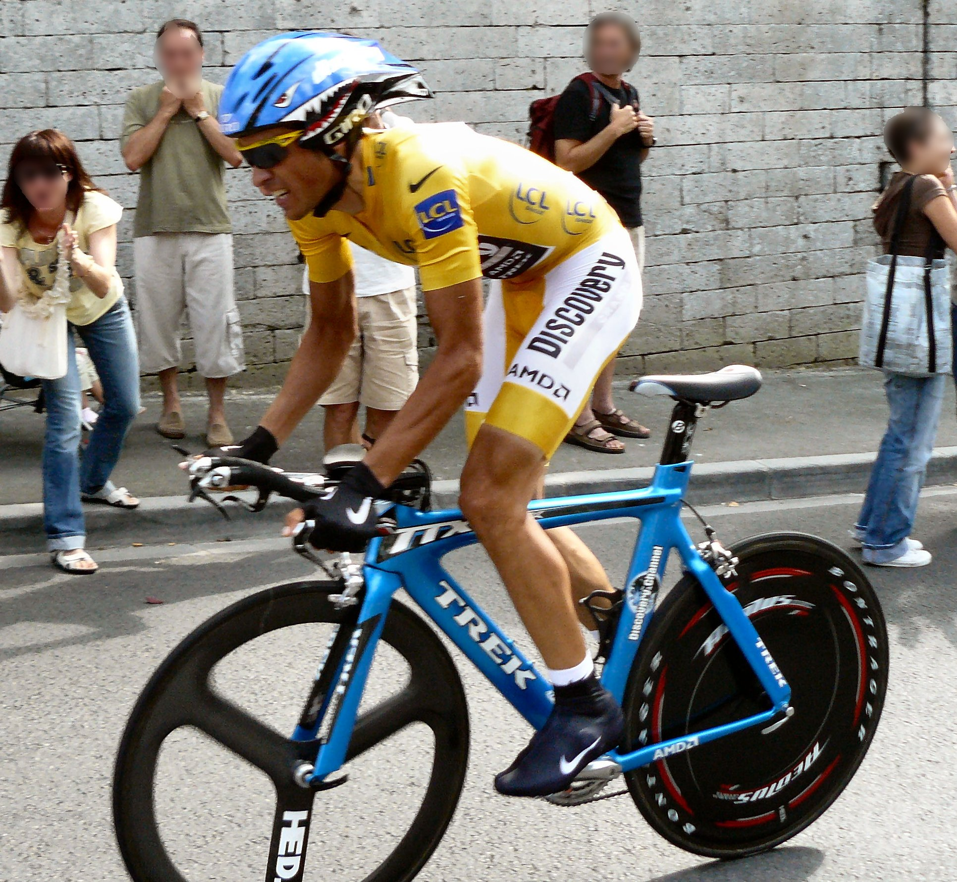 Alberto Contador dans la montée Avenue de Cognac (5 kms de l'arrivée), 19ème étape du Tour de France 2007